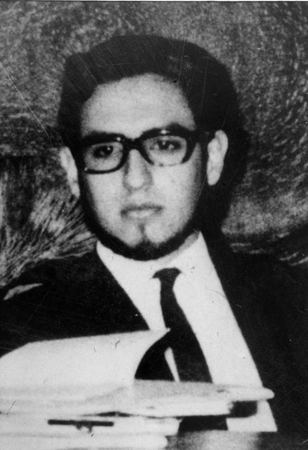 René Dávalos